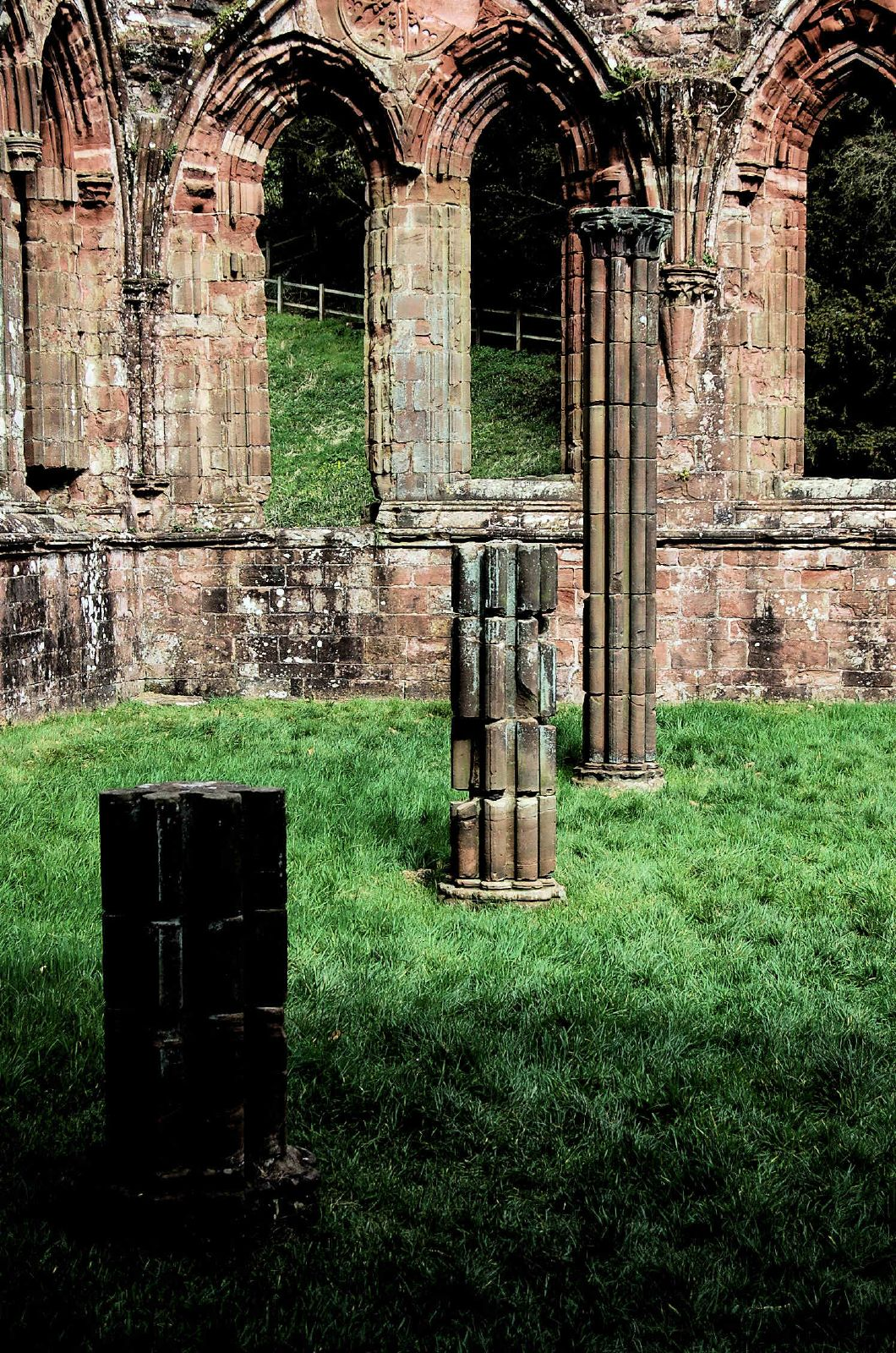 Furness Abbey